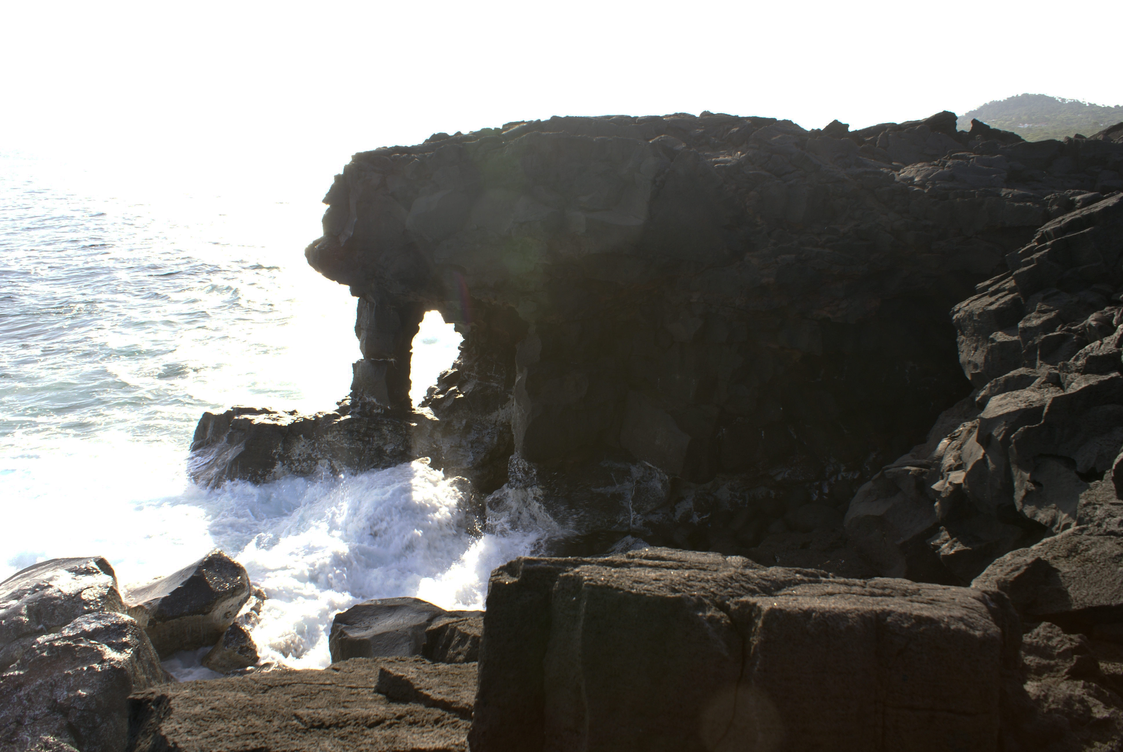 Paisagem Protegida de Interesse Regional da Cultura da Vinha da ilha do Pico, onde a lava encontra o mar, colunas de lava, Santa Luzia, Concelho de São Roque, Açores, Portugal